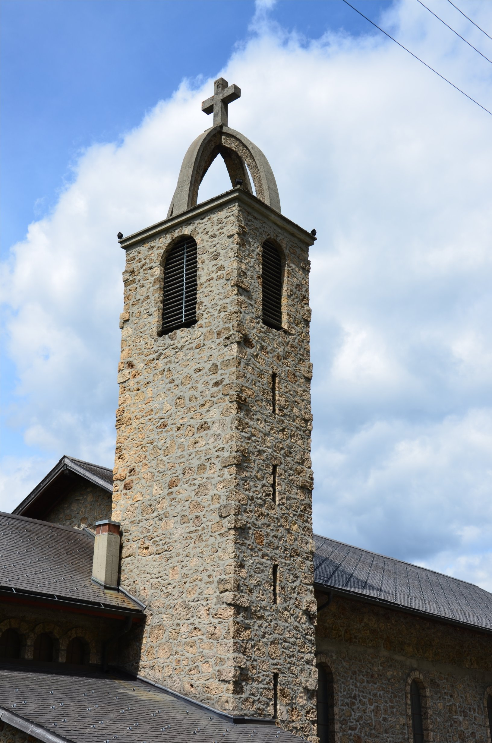 Clocher de l'église du Christ-Roi de Fey.